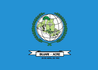 bandeiro de Bujari-Ac